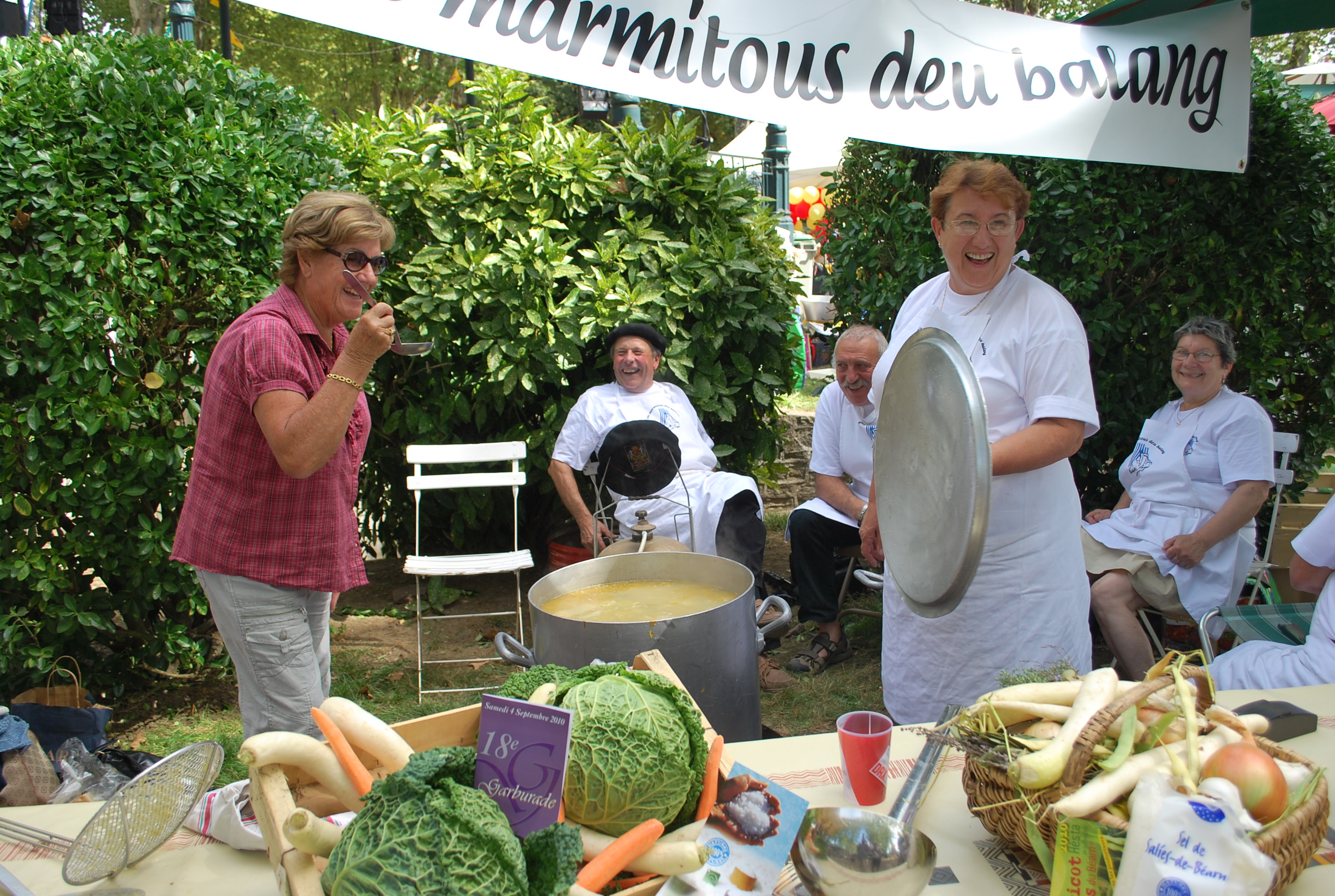 Un visiteur goute la célèbre garbure lors de la Garburade à Oloron-Sainte-Marie (Pyrénées-Atlantiques).